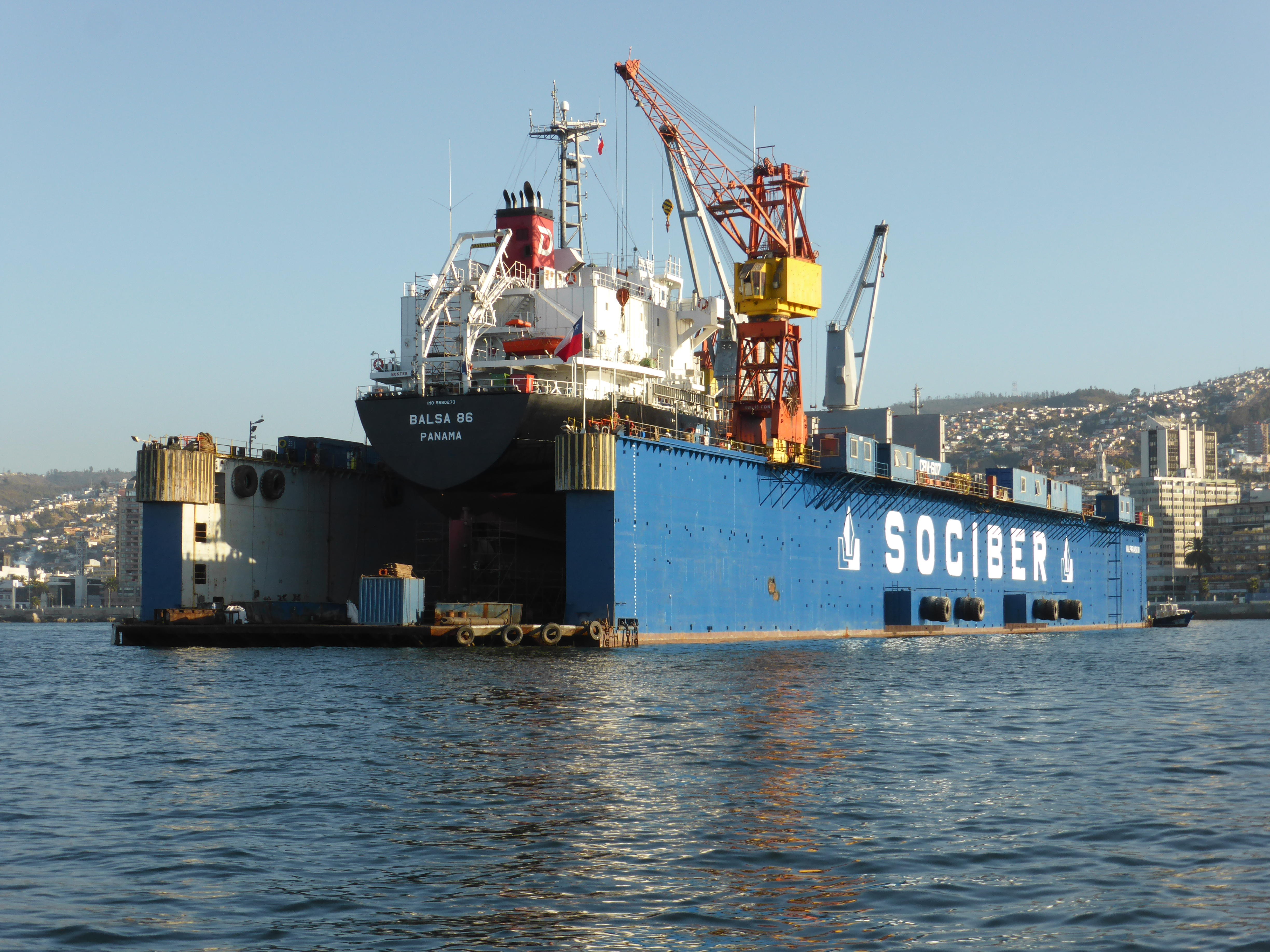 La empresa SOCIBER (Sociedad Iberoamericana de Reparaciones Navales Ltda.), dispone del dique flotante "Valparaíso III", desde el año 1985, construido en los astilleros de Asmar en Talcahuano. En la foto, en reparación se encuentra el carguero "Balsa 86", con matrícula de Panamá, IMO 9580273, construido en 2011.